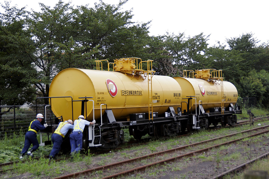 大川駅で行われていた手押しによる入替作業。2006年10月3日撮影[1]。手前の貨車はタキ5450形155475。 ↑ こちらを参照のこと。